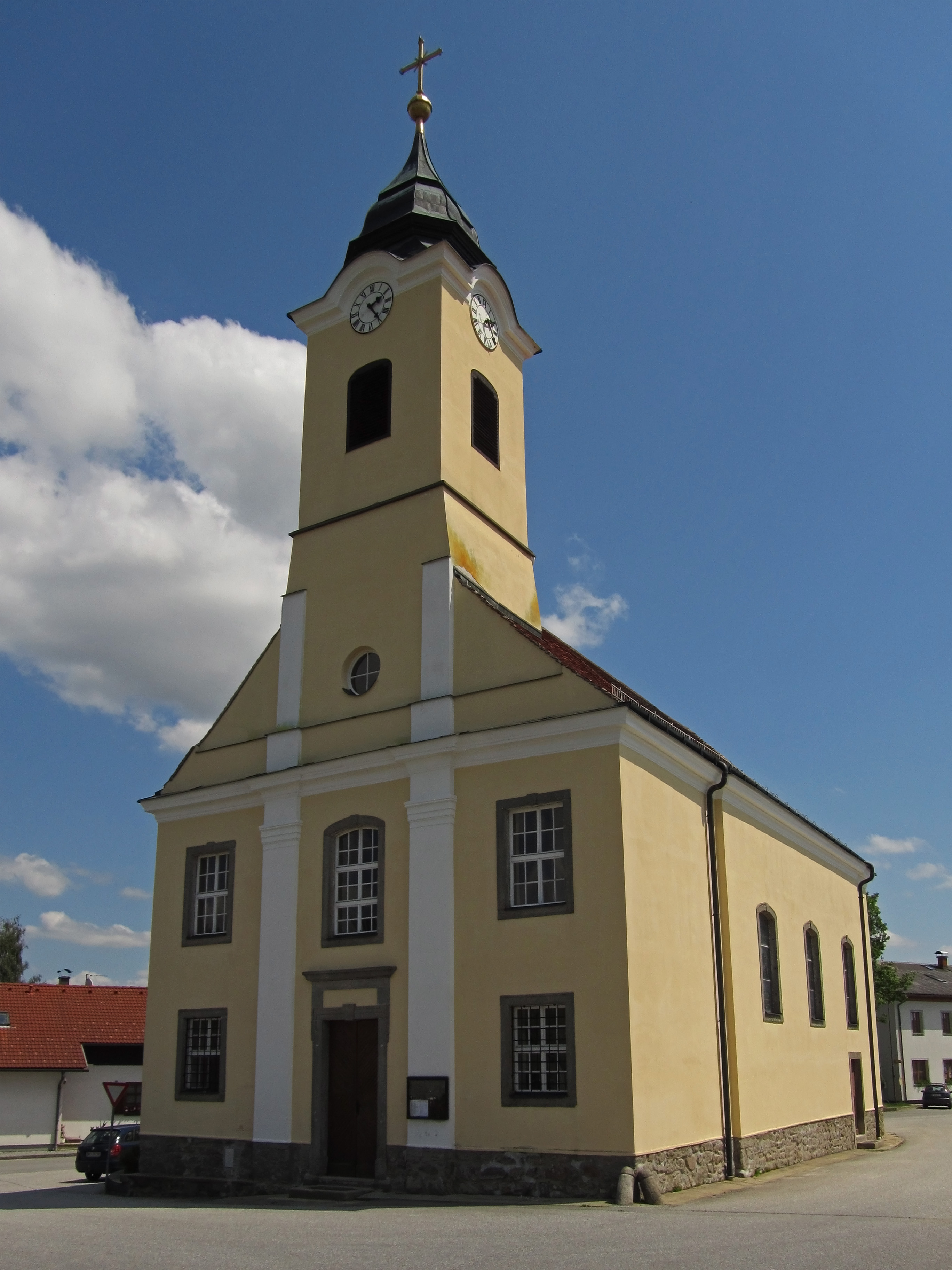 Kath. Pfarrkirche Hl. Dreifaltigkeit in Reingers